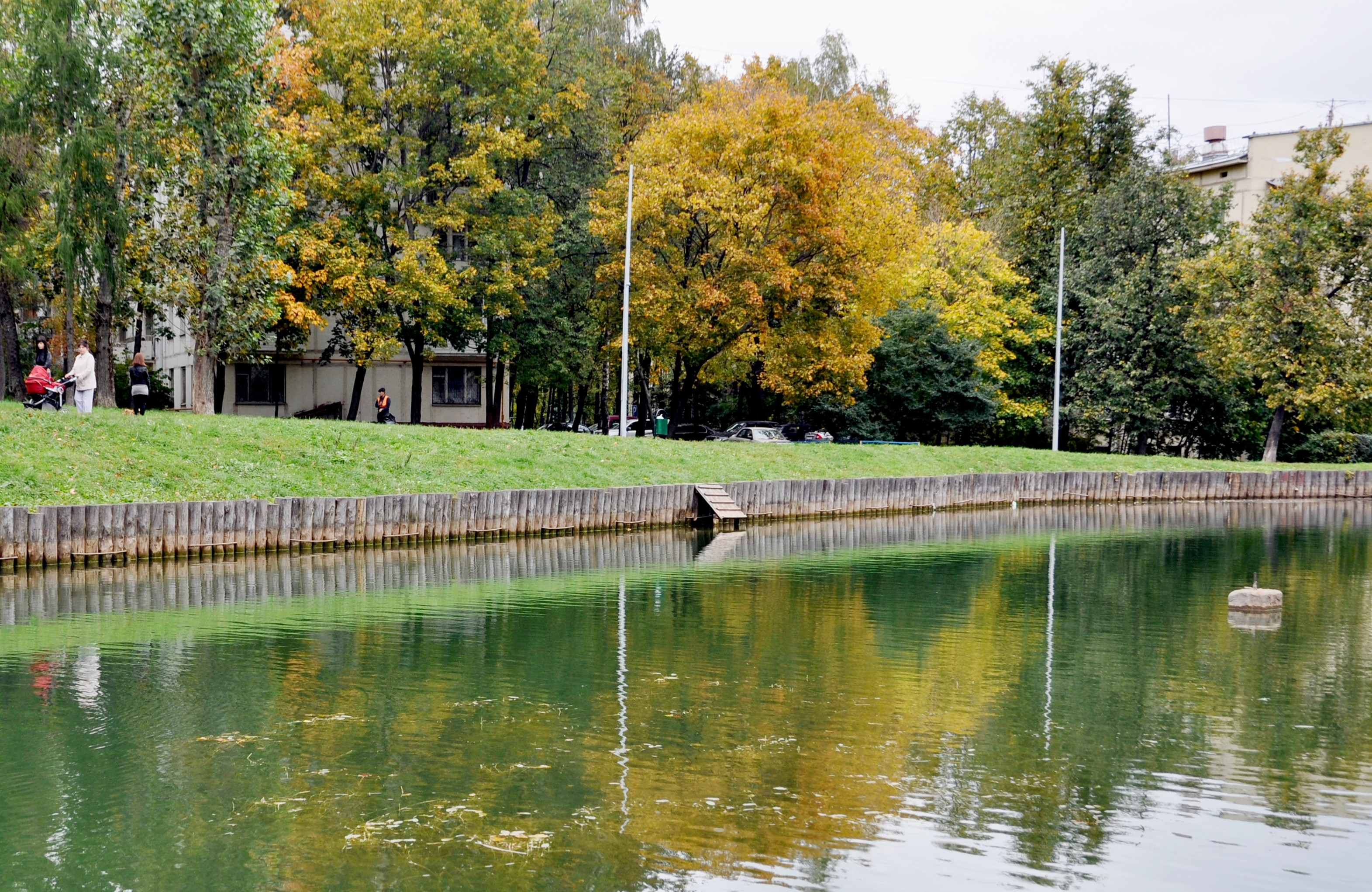 Перекопский пруд в г. Москве. Вид на западный берег